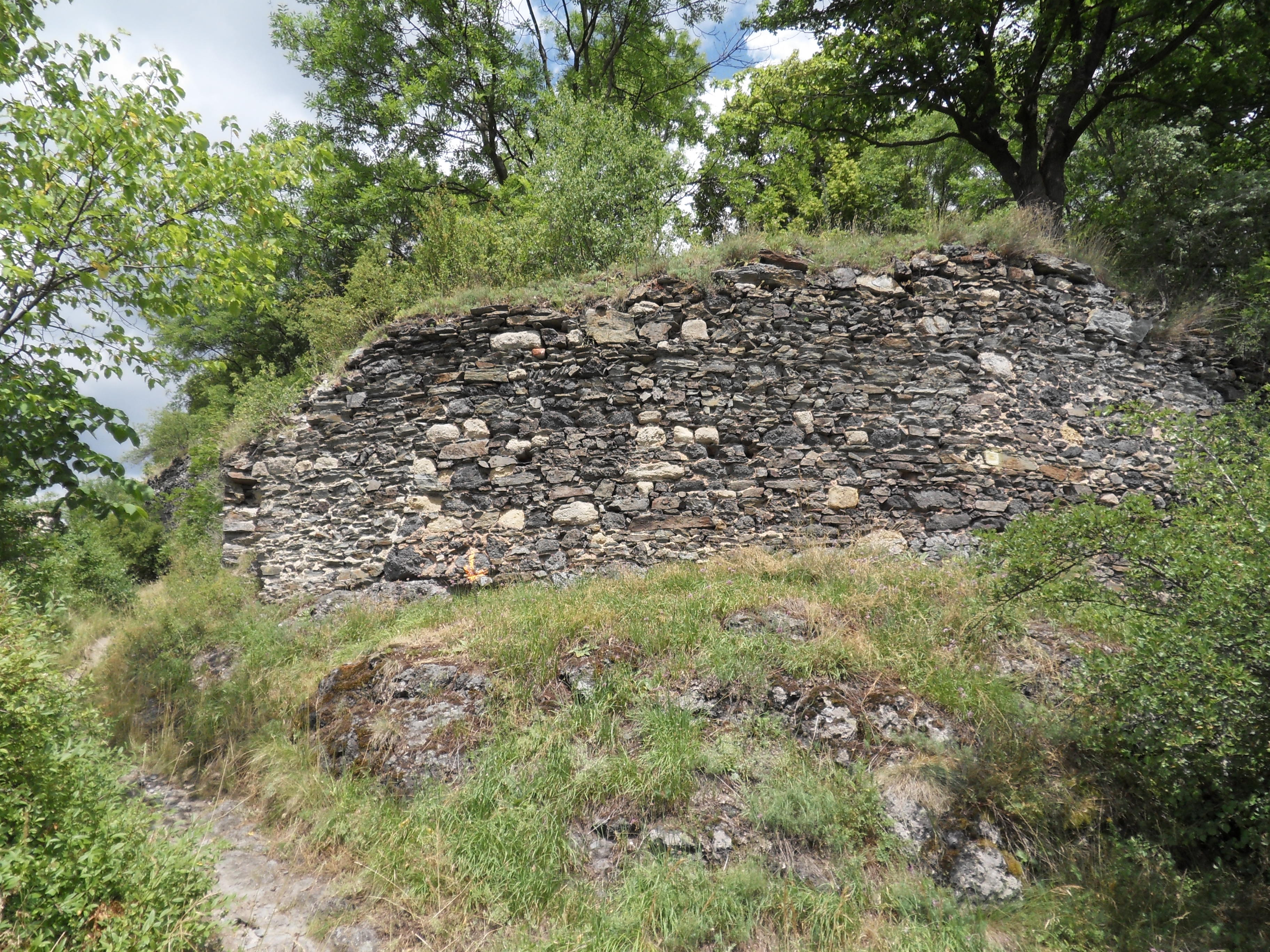 Hrad Preitenstein, na čedič. hranoli severně od zámku, Nové Městečko (Nečtiny).